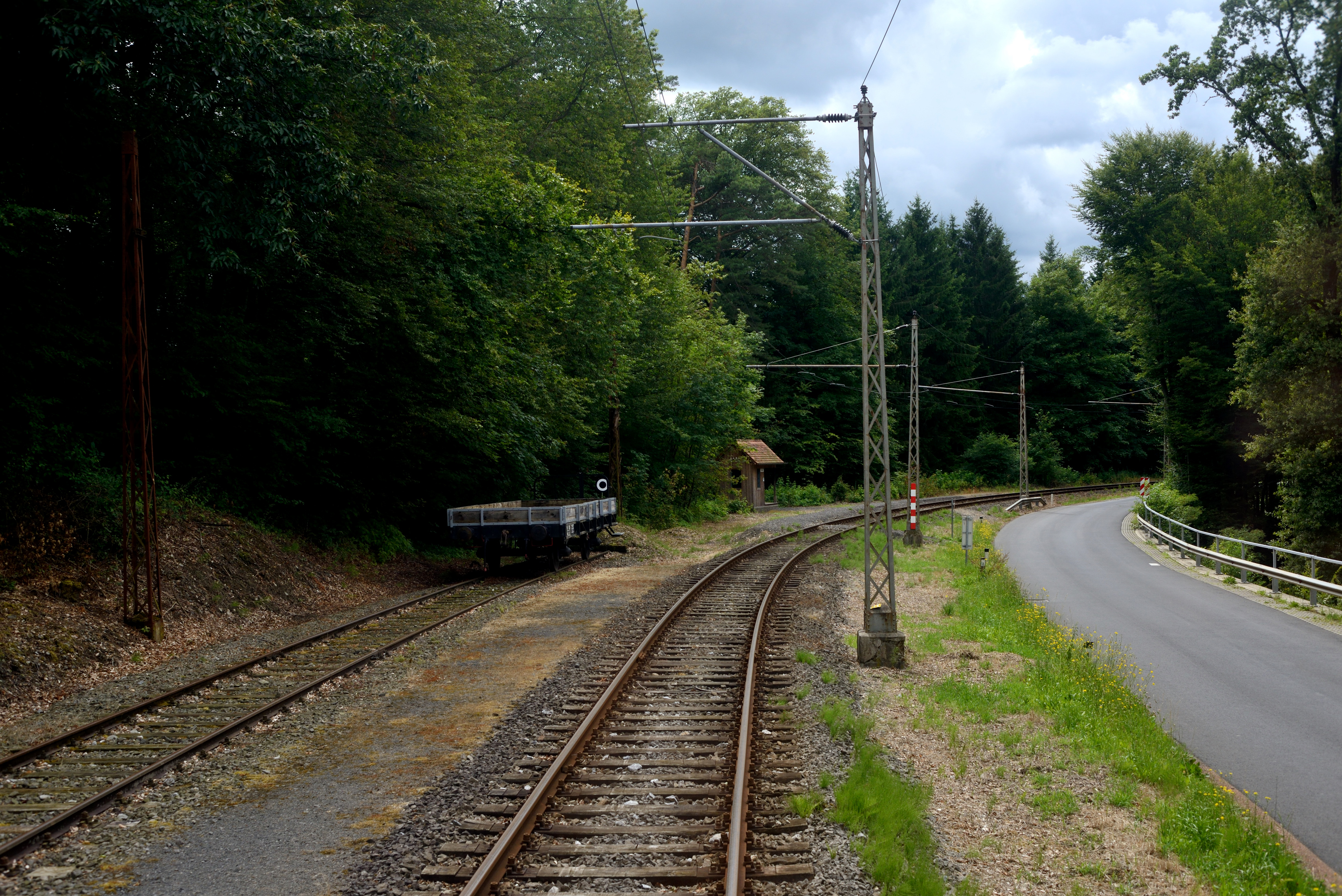 Halte- und Ladestelle Prädiberg